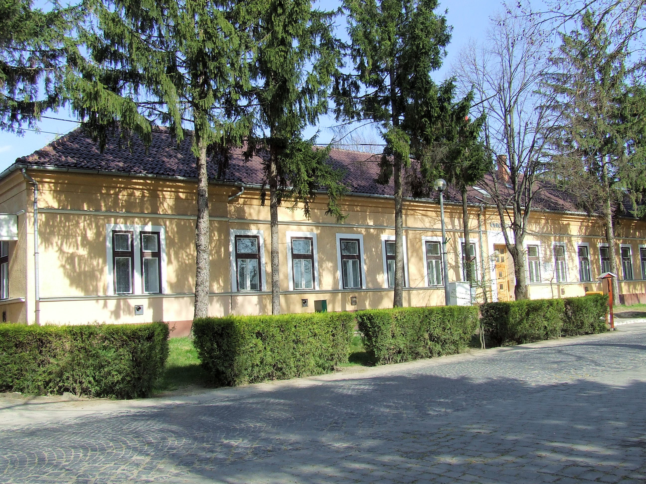 Városháza Jánoshalmán